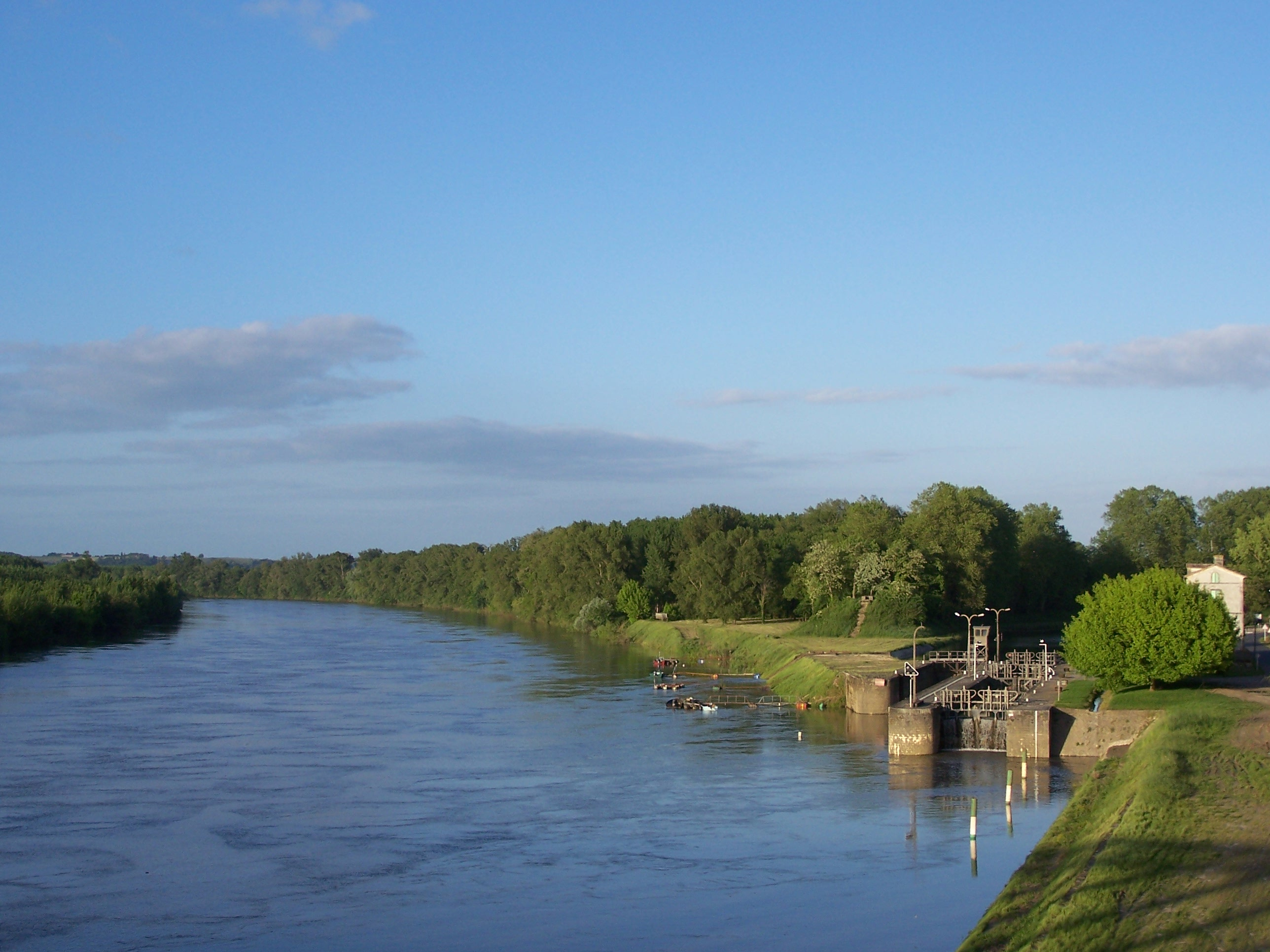 Écluse de Castets-en-Dorthe, Gironde, France